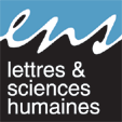 Logo der ENS LSH